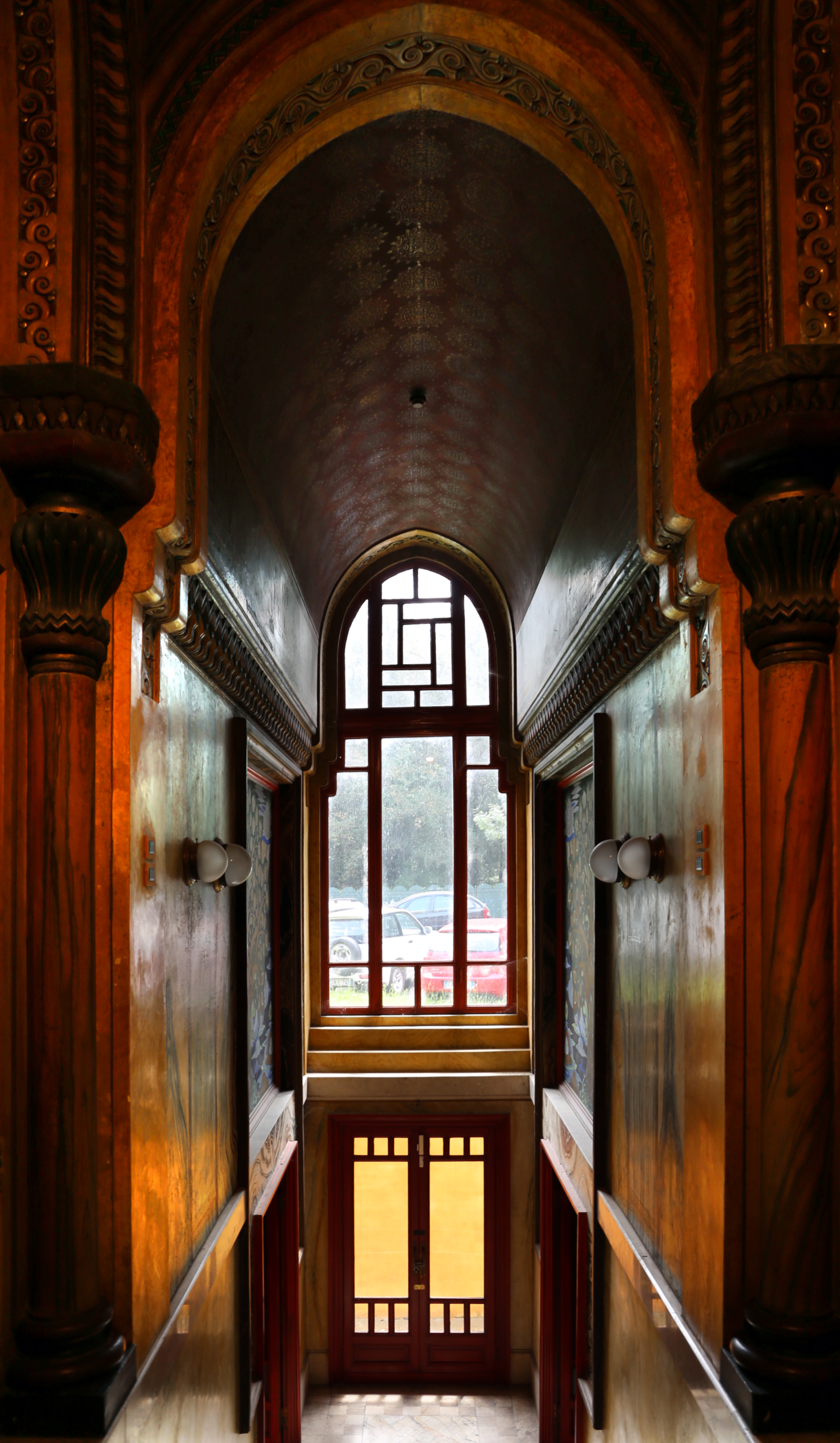 Palazzo dei Congressi (Salsomaggiore Terme) This is a photo of a monument which is part of cultural heritage of Italy.